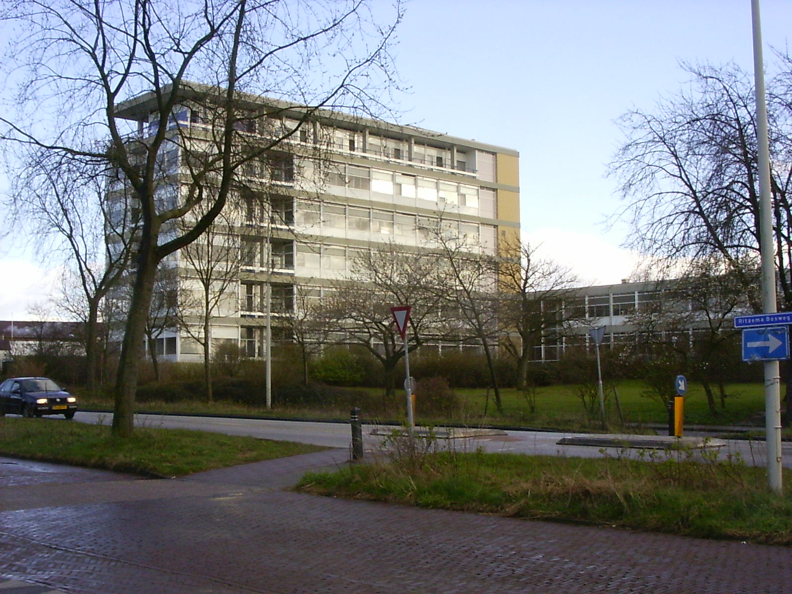 The Dreijenborch. Built in 1956. Architects: Mels van Boom and W. van Tijen (1894-1974).